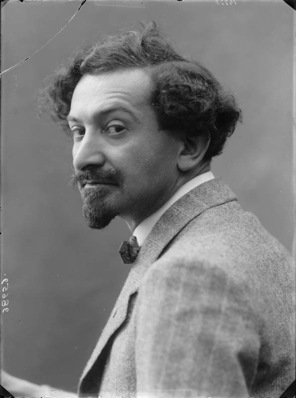 Filiberto Scarpelli